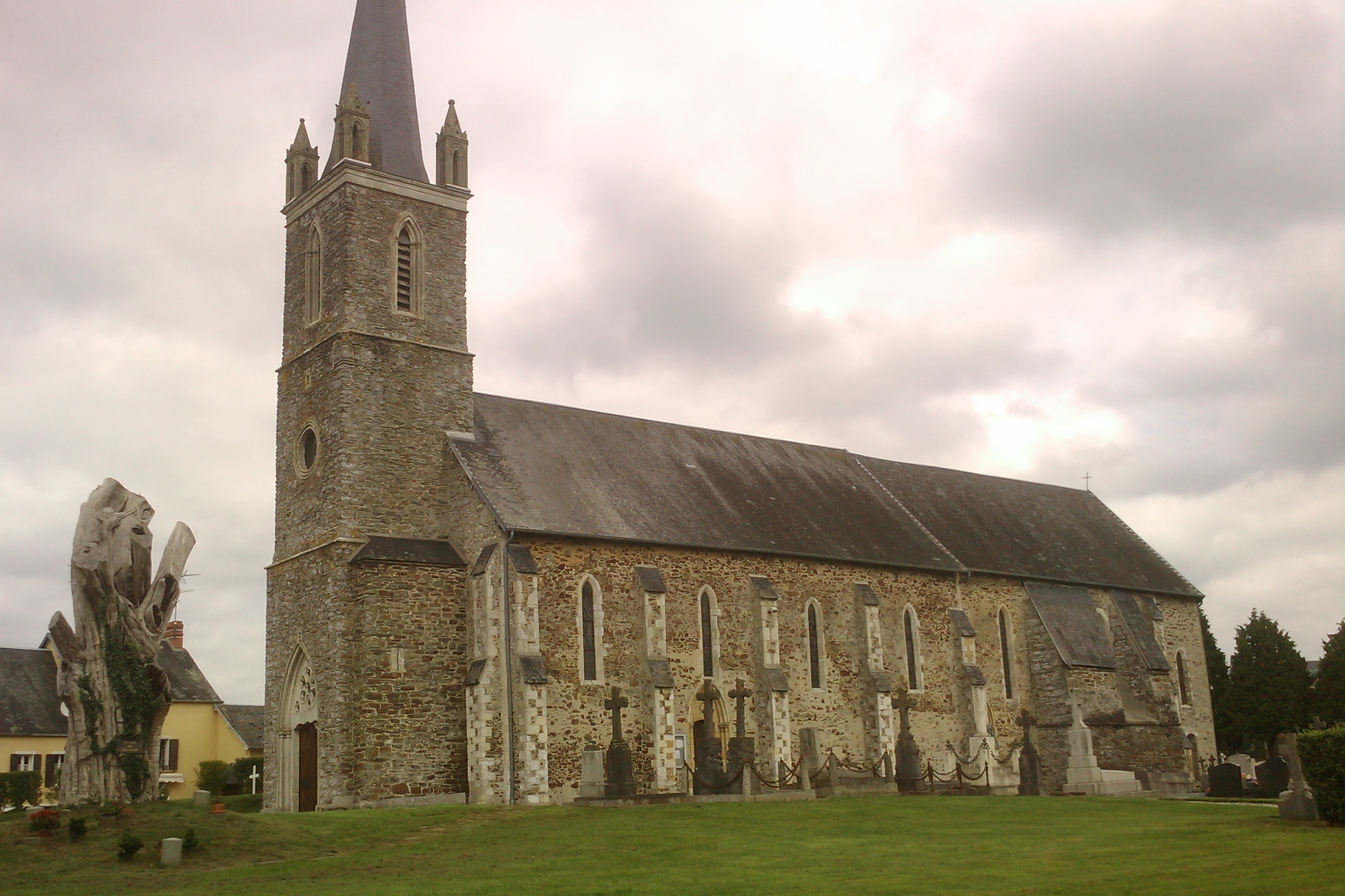 Église Saint-Ouen de Baudre